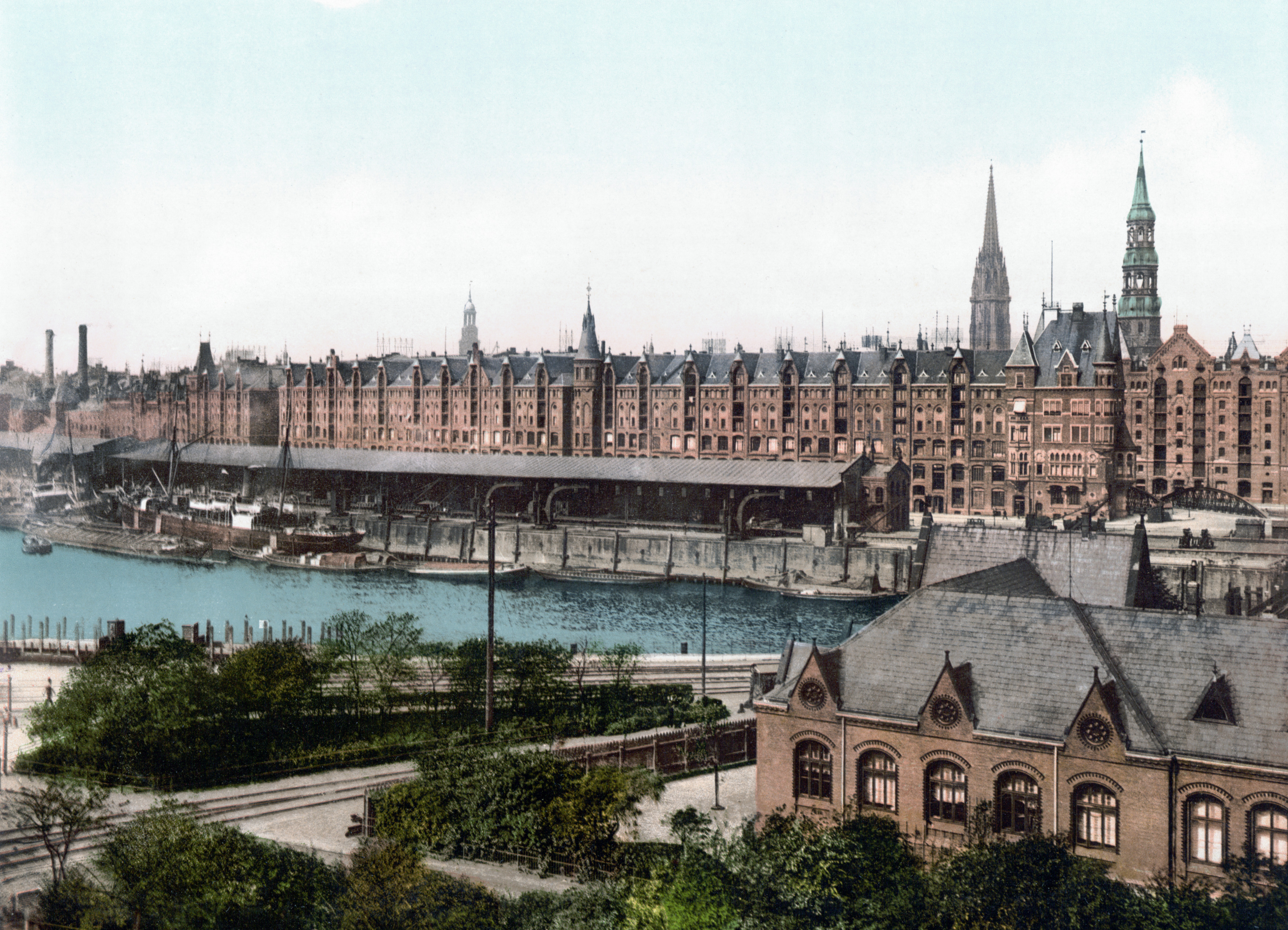 Die Speicherstadt in Hamburg-Altstadt, hier der Sandthorquai.